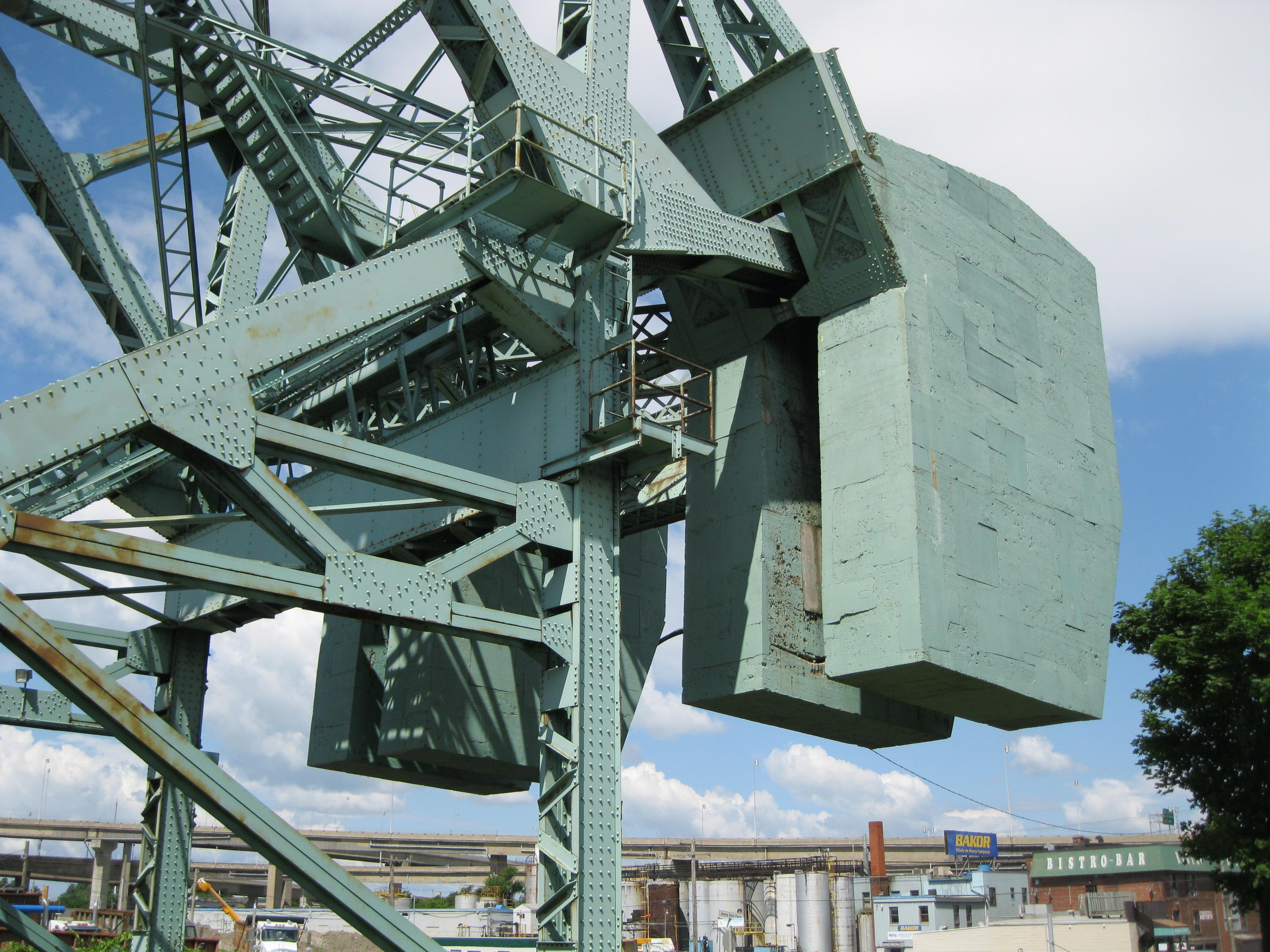 Pont Gauron, au dessus du canal de Lachine, LaSalle, Montréal